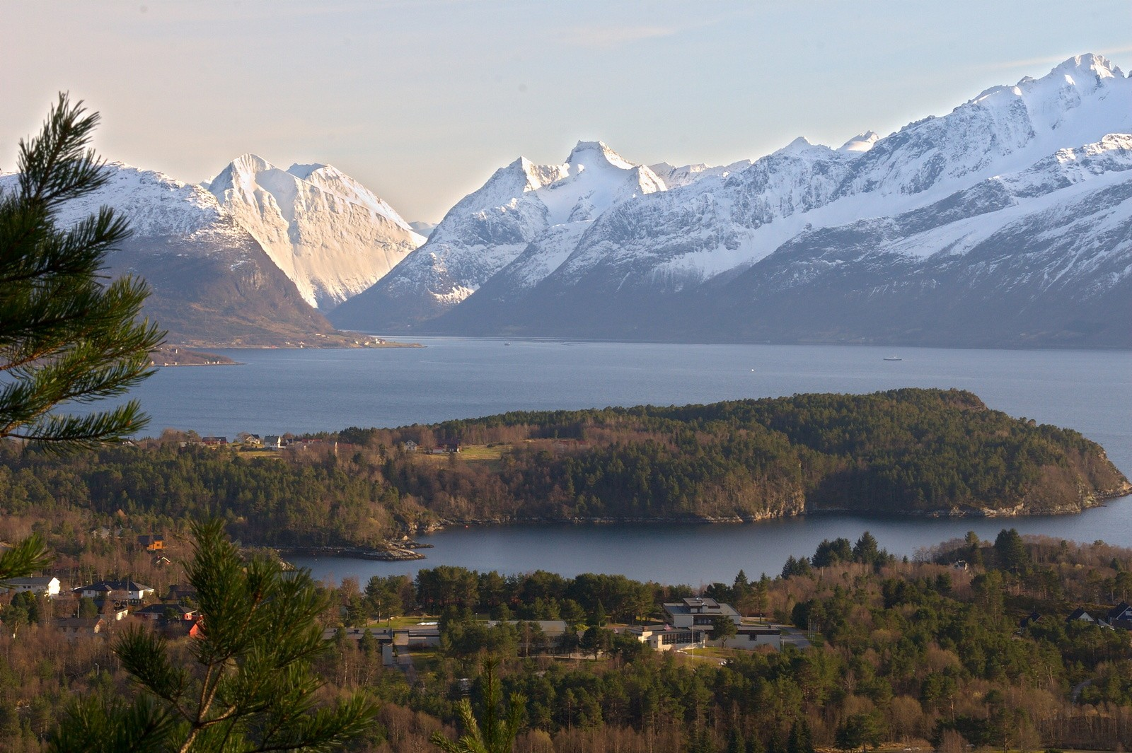 I forgrunnen Borgund folkehøgskole, så Flisnes og Storfjorden med Jønshorn til høyre i bildet.